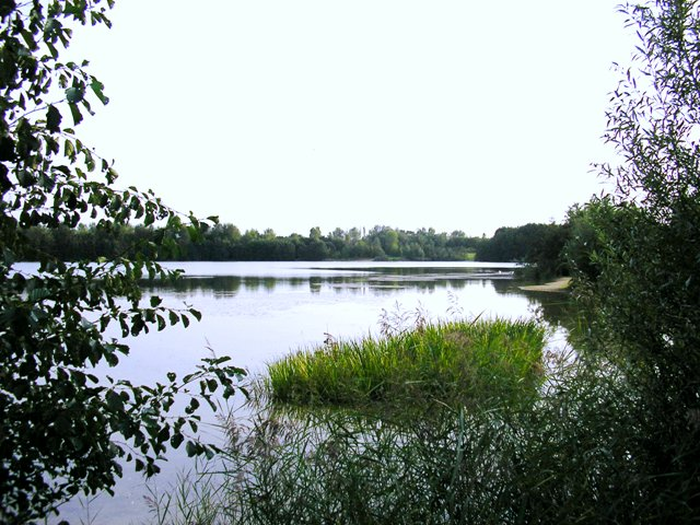 Ufer des Peringssee, Bergheim